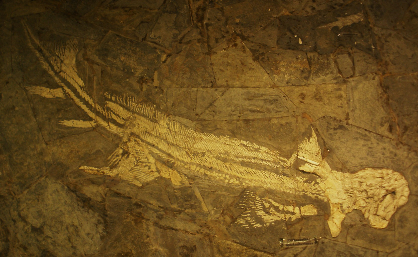 Fossil of Orthacanthus, an extinct fish